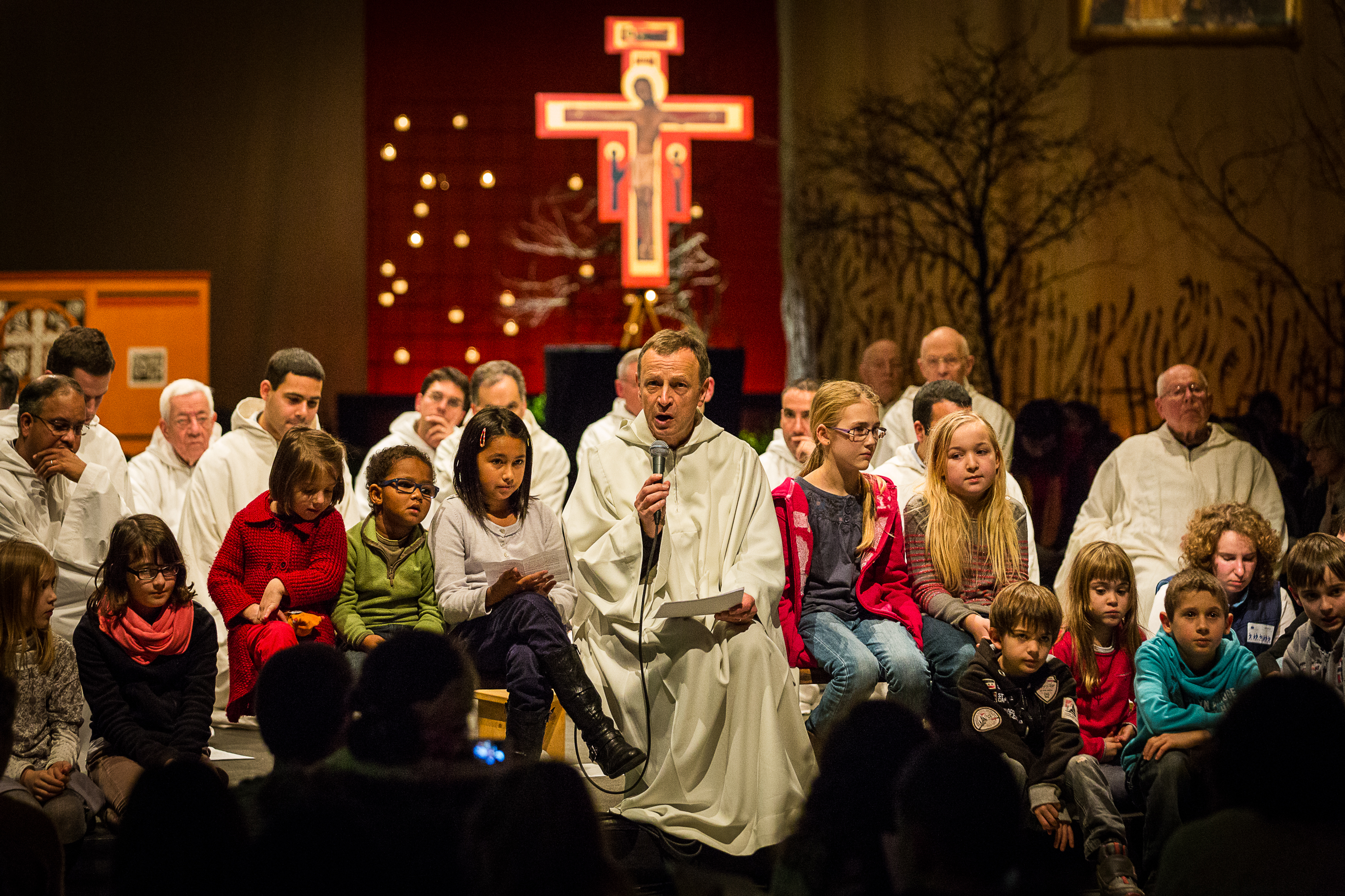 36e rencontres internationales de Taizé Strasbourg 28 décembre 2013